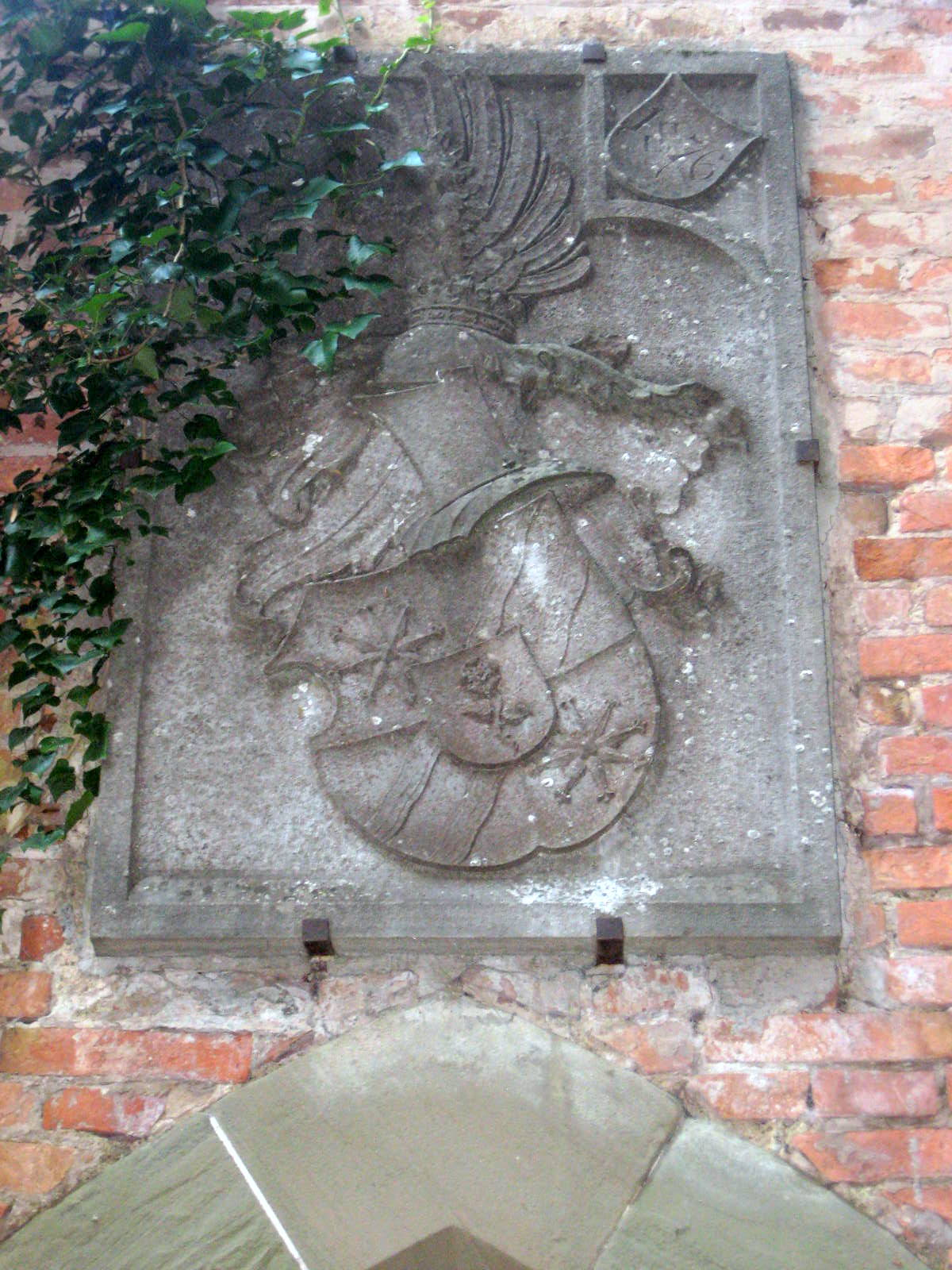 Dieses Wappen befindet sich hinter dem schlossseitigen Zugang zum Untergeschoss der Gruftkapelle.